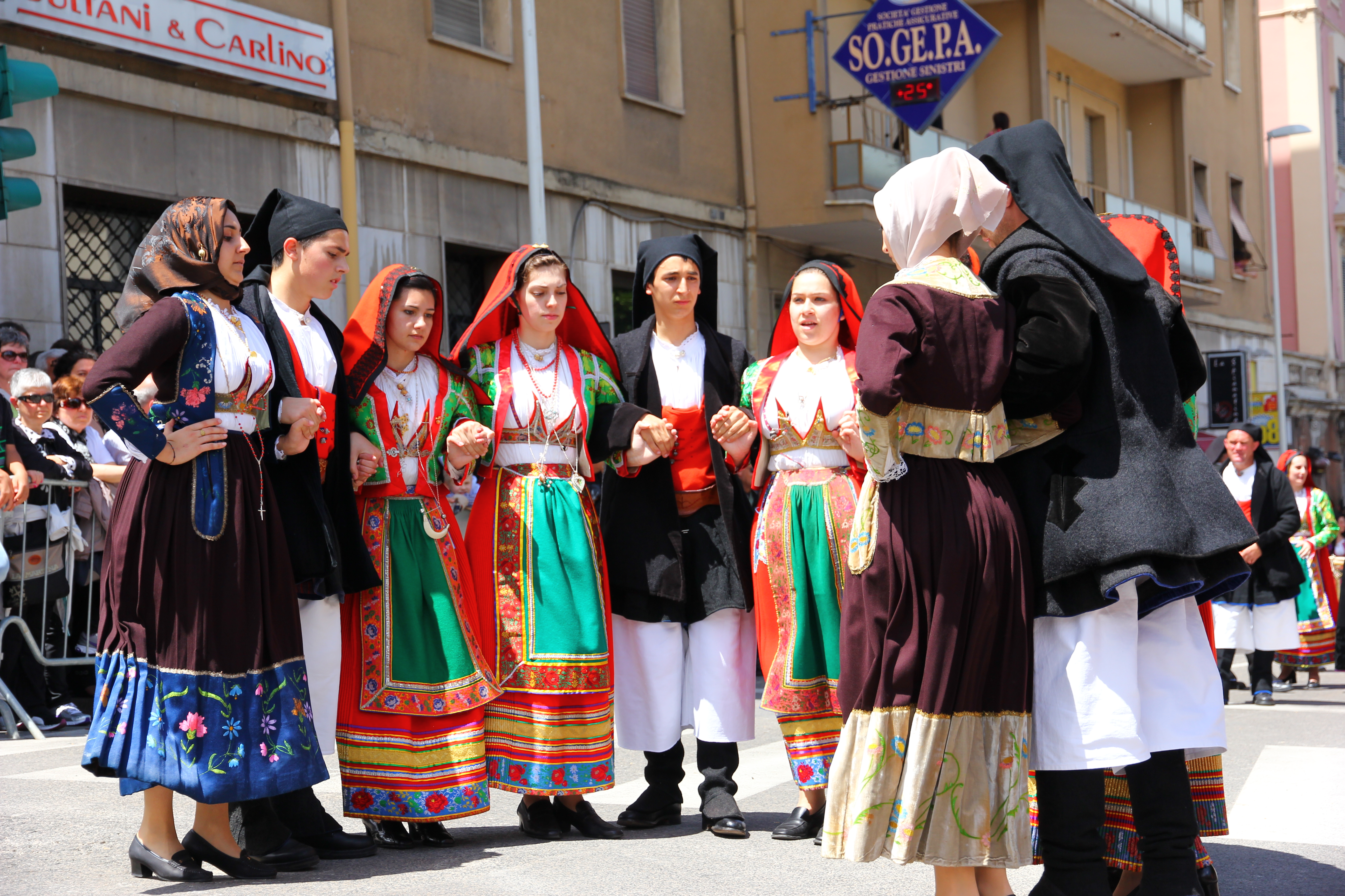 Cavalcata Sarda 2013 (Sassari)